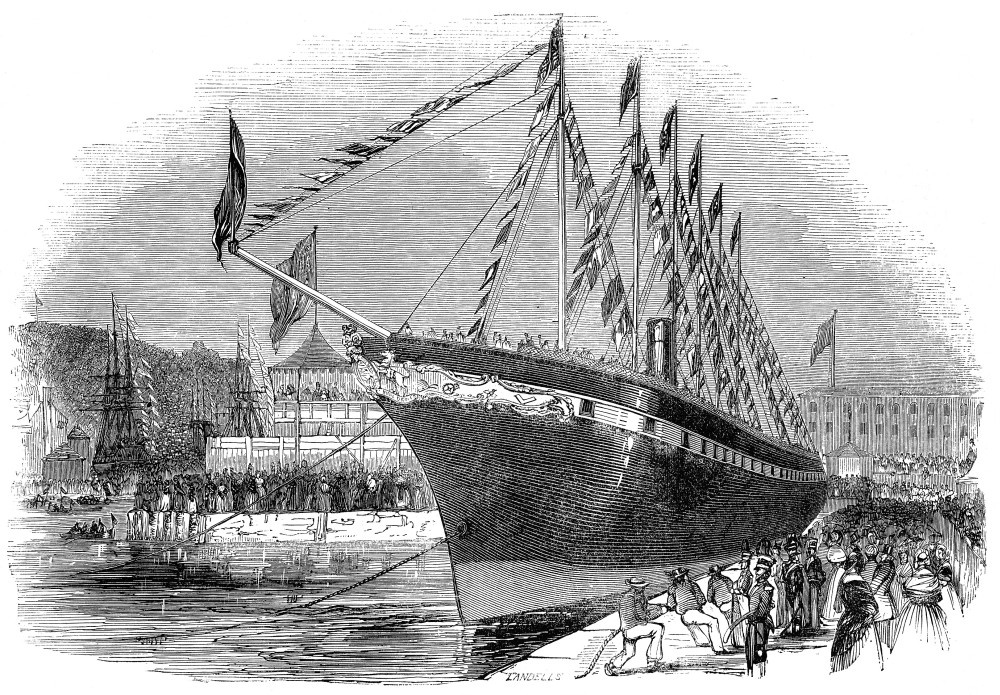 Das vom Stapellaufen des Great-Britain.